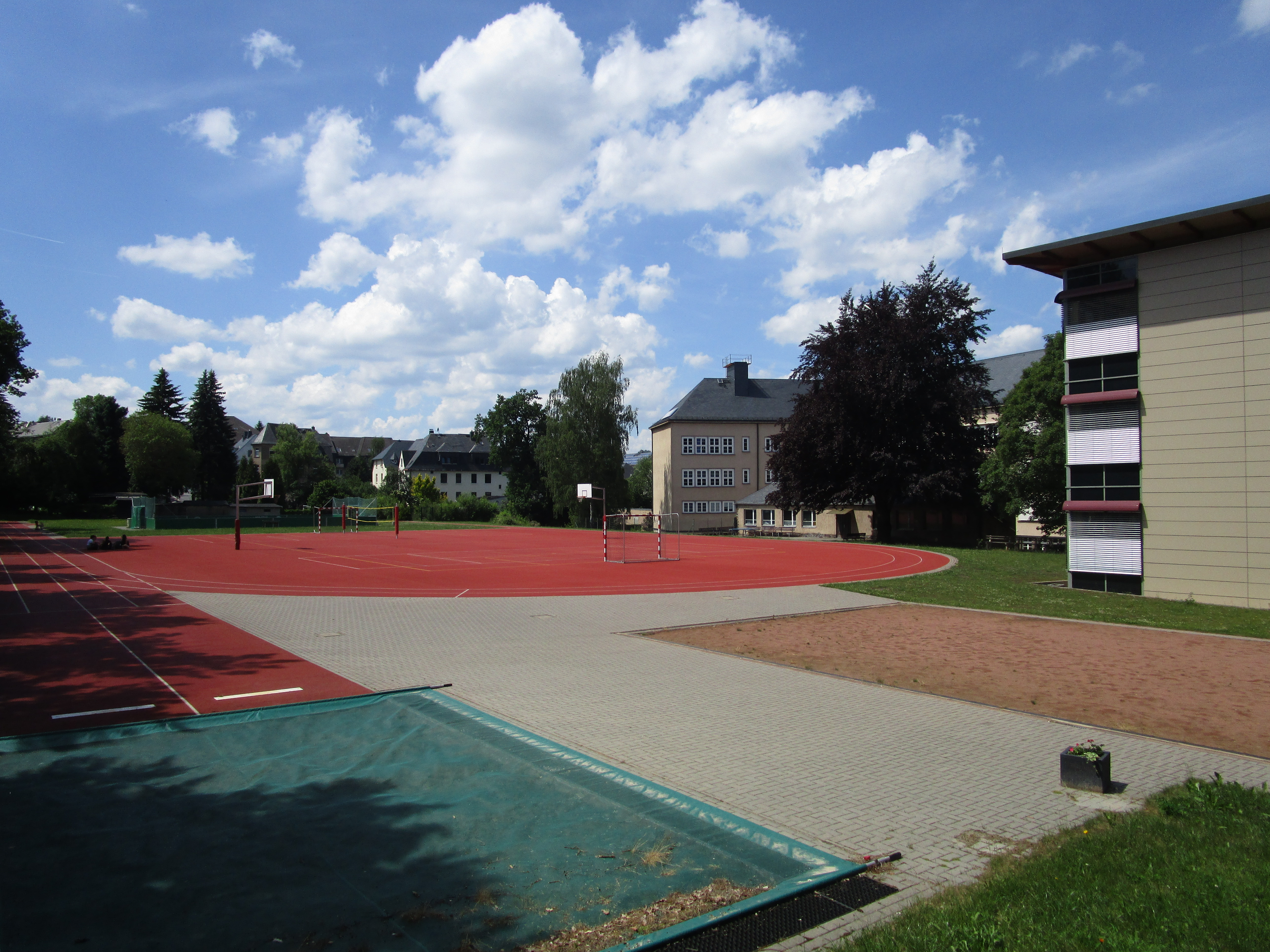 Neuer Sportplatz (Foto: 2018)